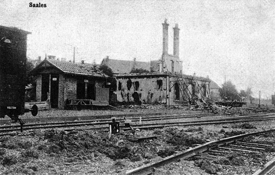 En 1915, les ruines de la gare de Saales détruite par des bombardements.